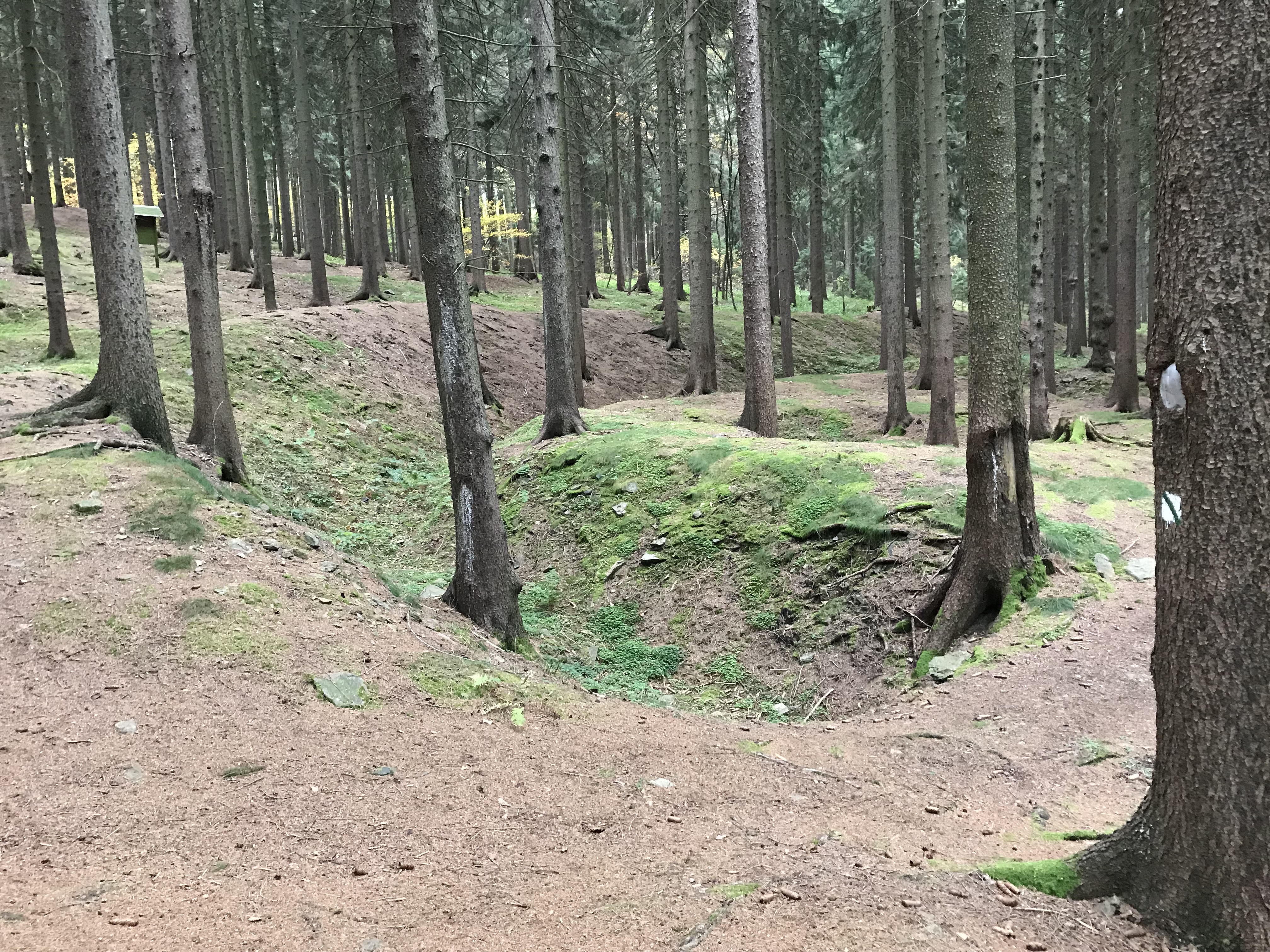 Pingenzug im Hohen Forst